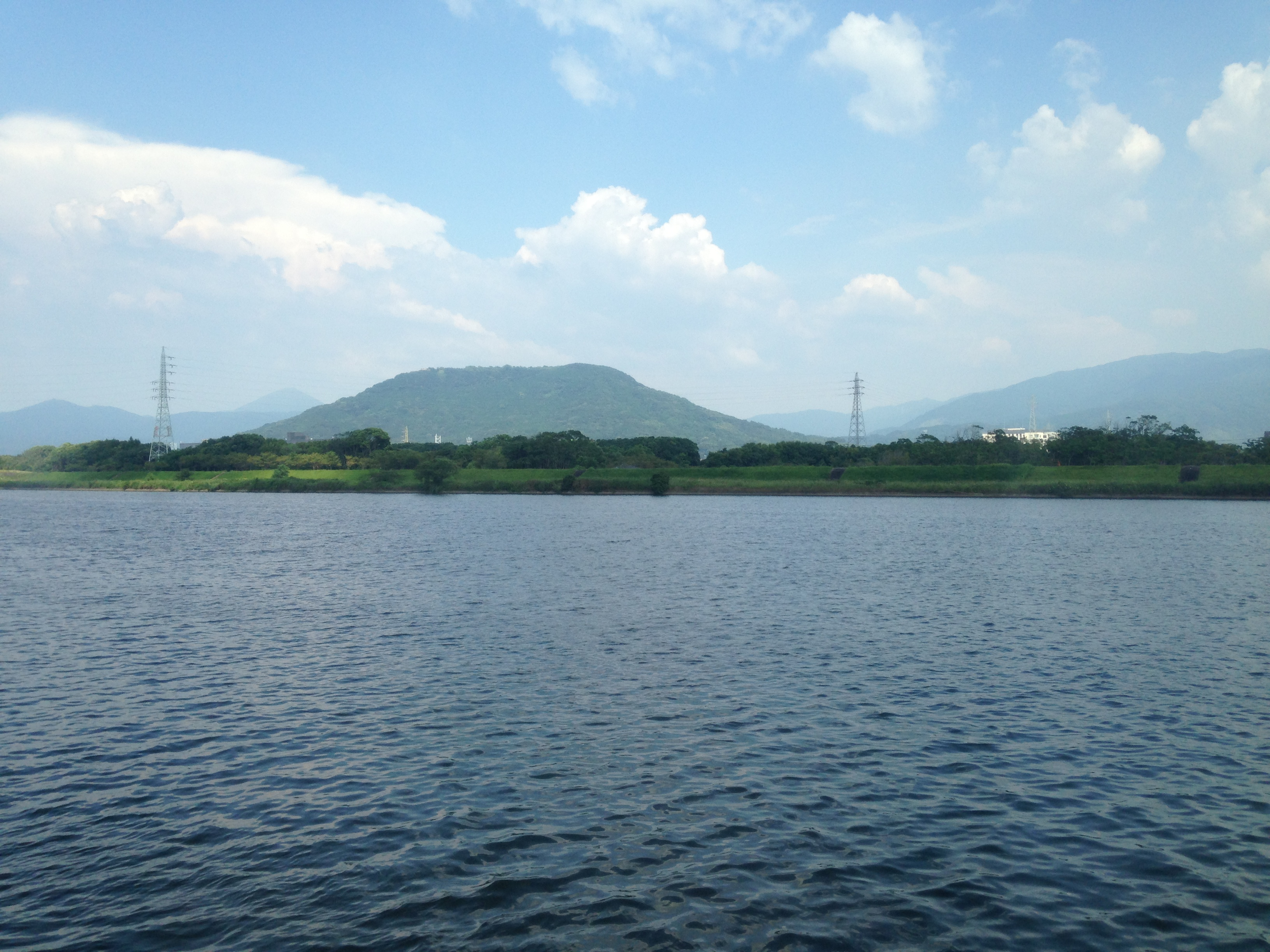 鬼塚駅に停車中の列車内より望む松浦川と鏡山